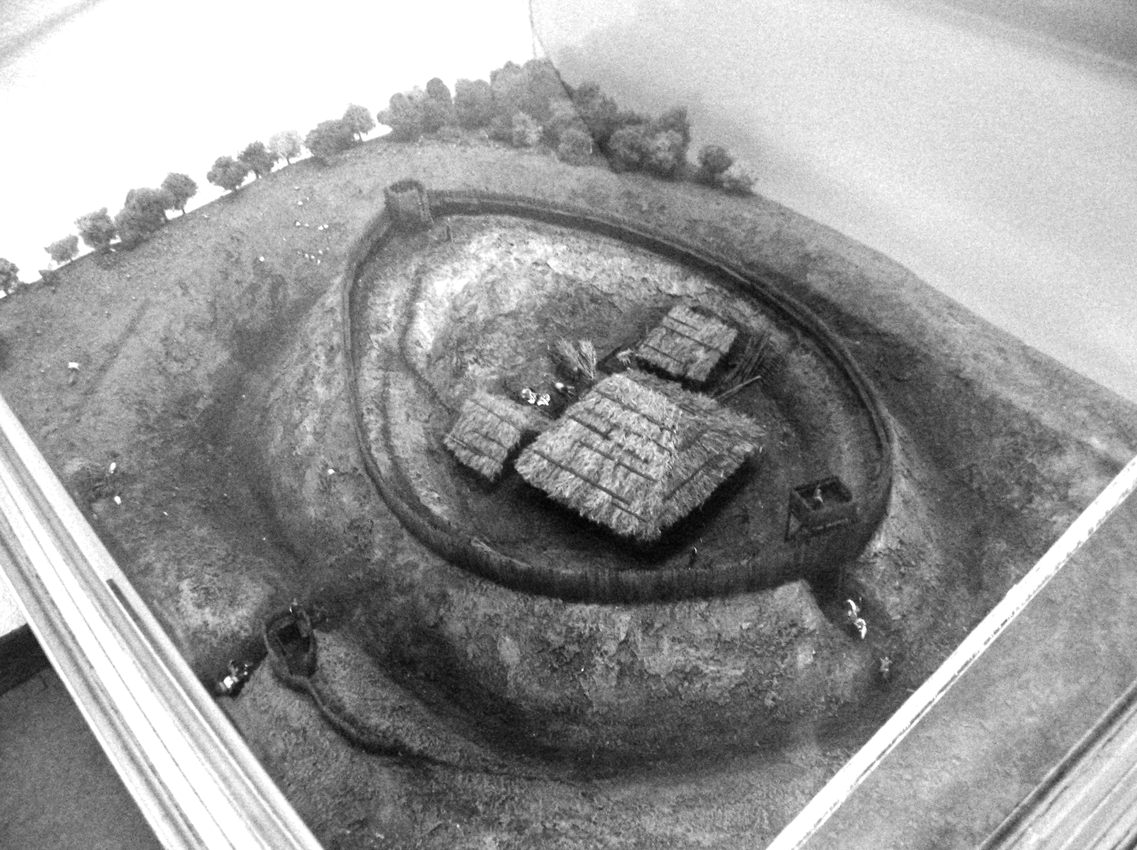 La motte castrale du Châtelard à Chirens. Musée archéologique du lac de Paladru. Charavines, Isère, AuRA, France.